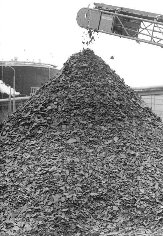 Schwarzheide, VEB Synthesewerk, Klärschlamm ADN-ZB Link 9.1.90-erd-Bez. Cottbus: Abprodukte -Rückgewinnung von Substanzen aus Industrieabwässern- Bei der Reinigung von Industrieabwässern im VEB Synthesewerk Schwarzheide fallen täglich mehrere Tonnen Bioschlamm als Abprodukt an. Der mit seinem hohen Kalkanteil versetzte Bioschlamm wird in gepreßtem Zustand (Foto) für die Rekultivierung von Deponie- und Kippenflächen eingesetzt. Die weitere landwirtschaftliche Verwertung dieses nährstoffreichen Abprodukts wird durch einen zu hohen Schwermetallgehalt, speziell von Nickel, gefährdet. Gemeinsam mit Forschungseinrichtungen der DDR wird an der Senkung des Nickelgehalts in Abfallströmen im VEB Synthesewerk Schwarzheide gearbeitet. Das Ziel besteht darin, das Nickel in den Produktionsprozeß zurückzuführen und somit Stoffkreisläufe im Sinne der Rohstoffersparnis bei gleichzeitiger Umweltverbesserung zu schließen.